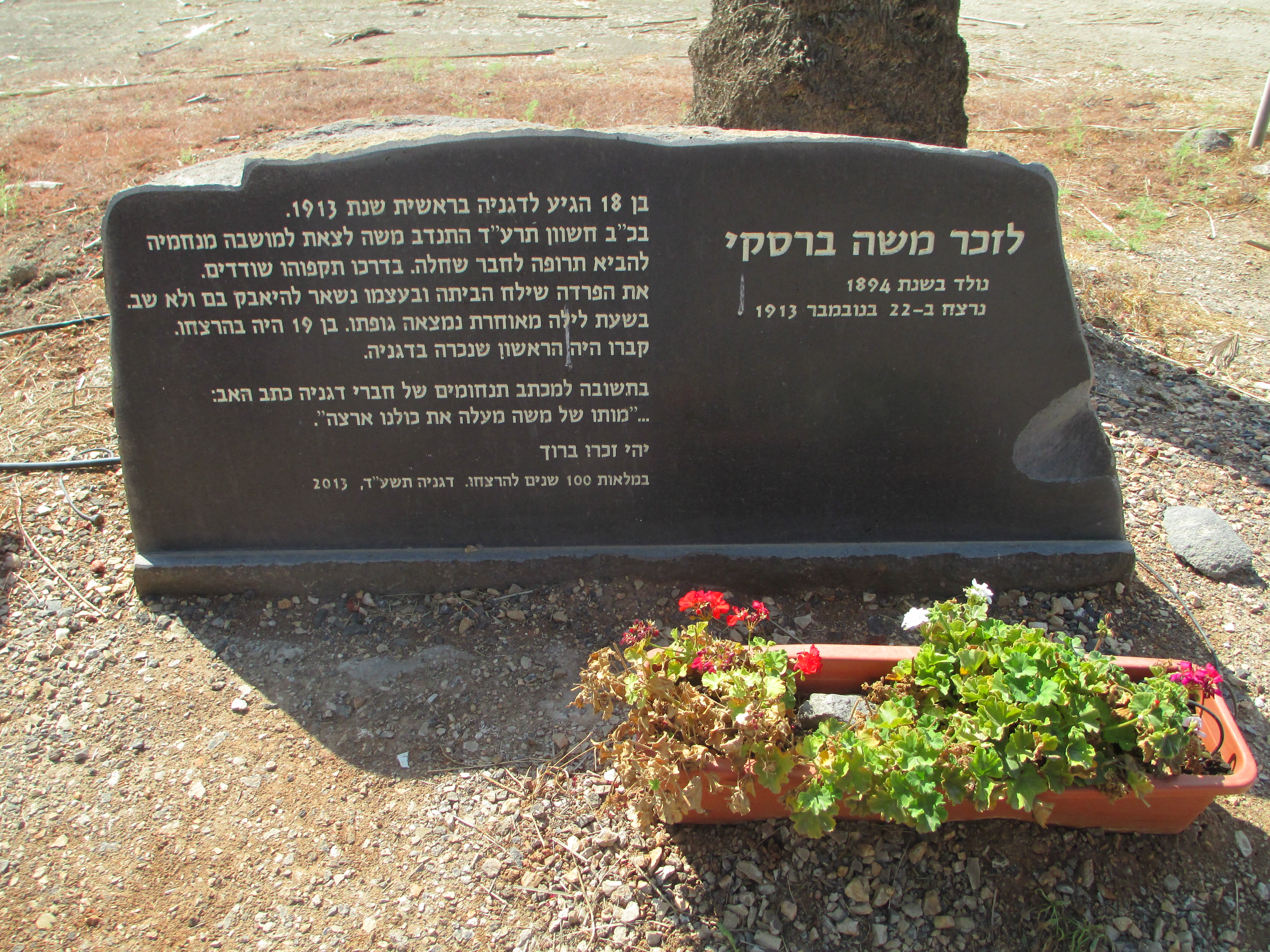 אנדרטה למשה ברסקי ליד אום ג'וני